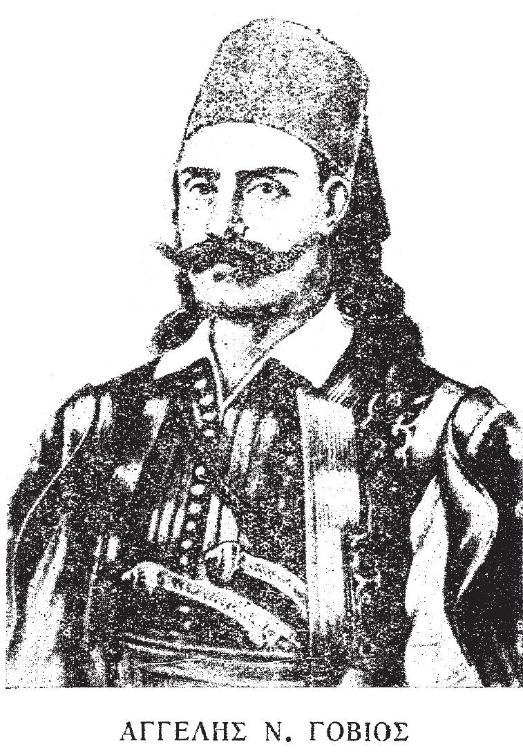 Griechischer Nationalkämpfer, 19. Jahrhundert